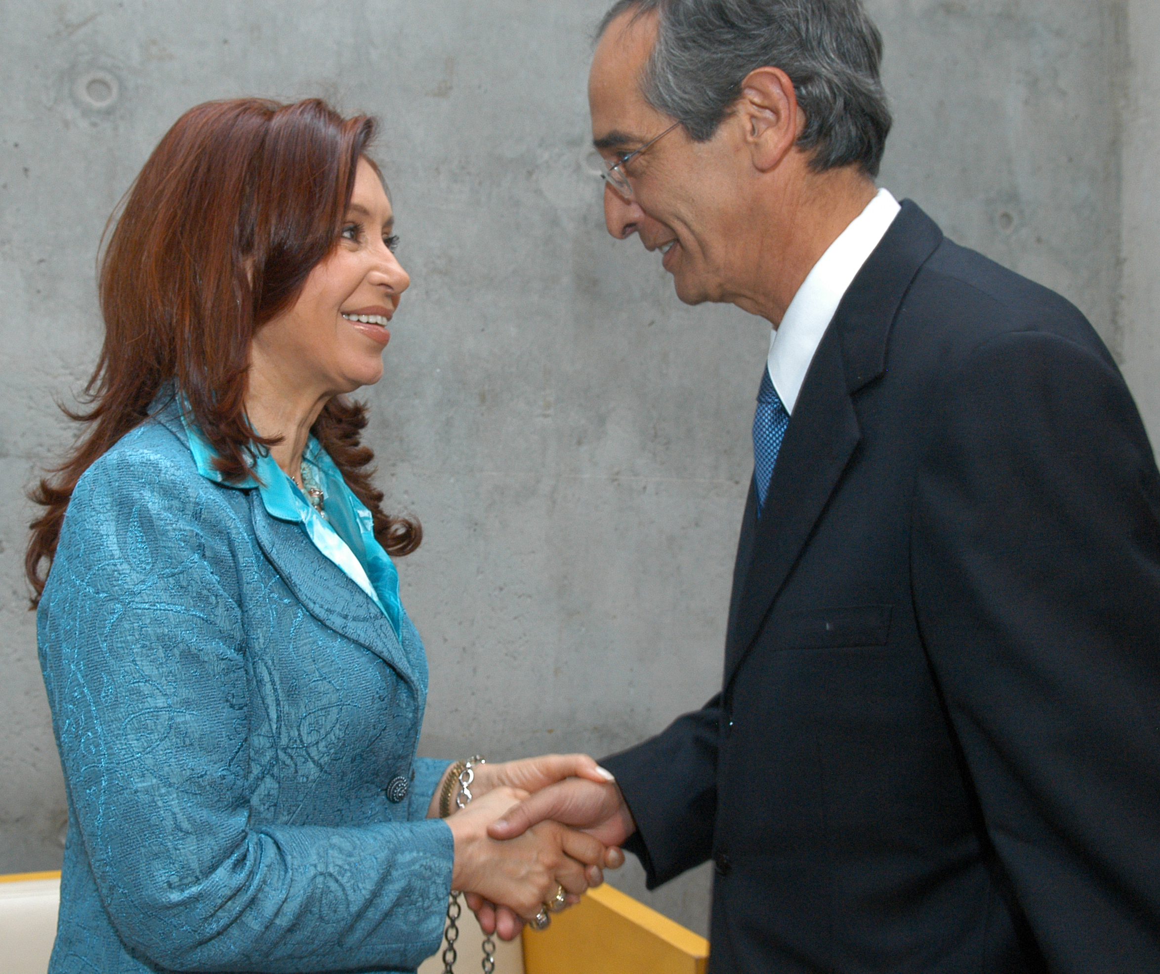 Alvaro Colom Caballeros y Cristina de Kirchner